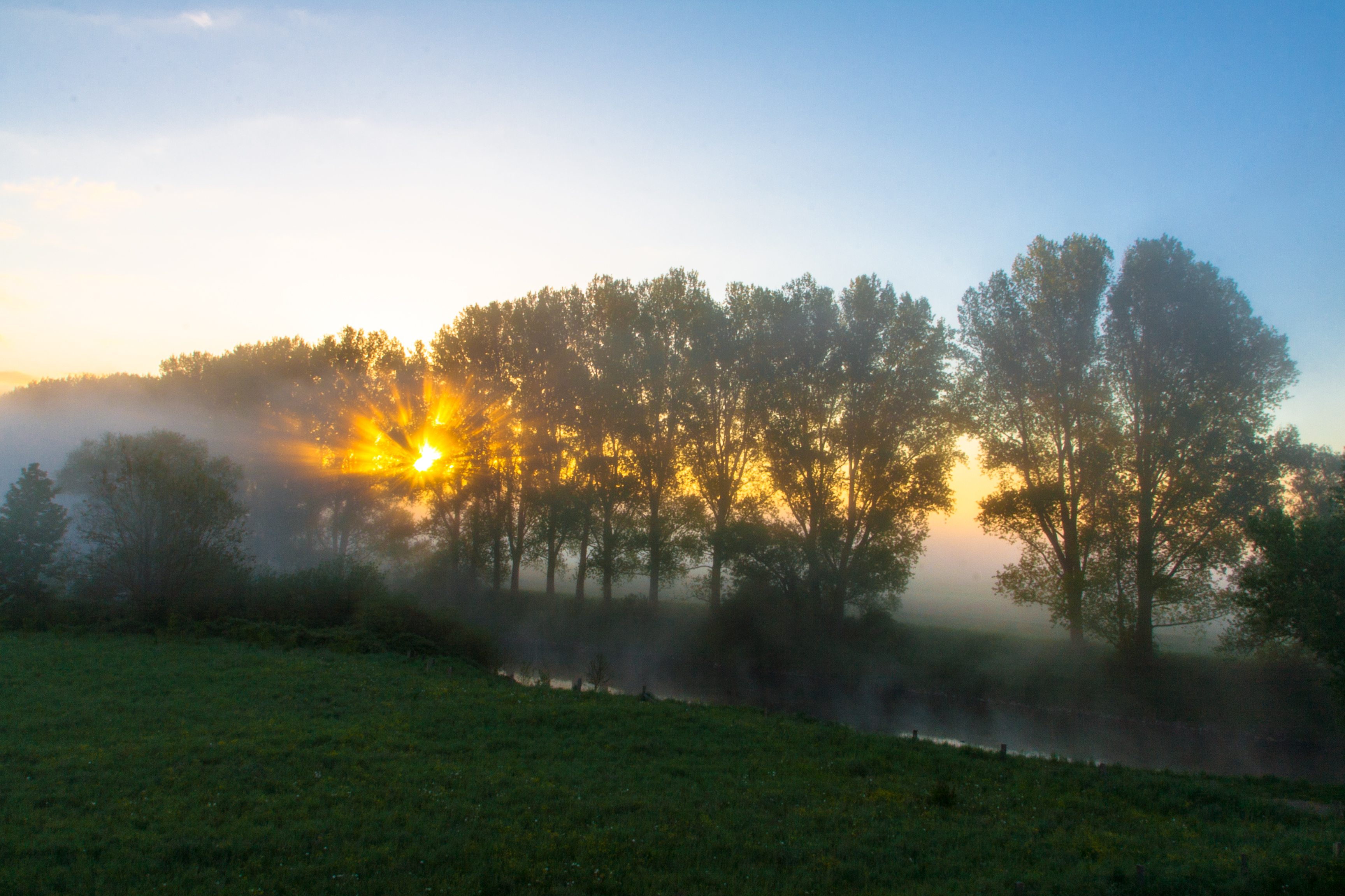 Sonnenaufgang im Naturschutzgebiet „Lippeaue“ (NSG WES-001) zwischen Drevenack und Hünxe. Das Foto wurde von der Kanal-/Lippebrücke aufgenommen.